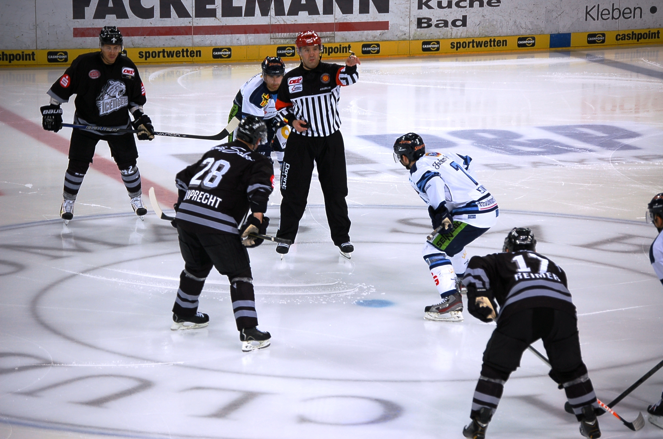 Steven Reinprecht, Patrick Reimer und Yasin Ehliz